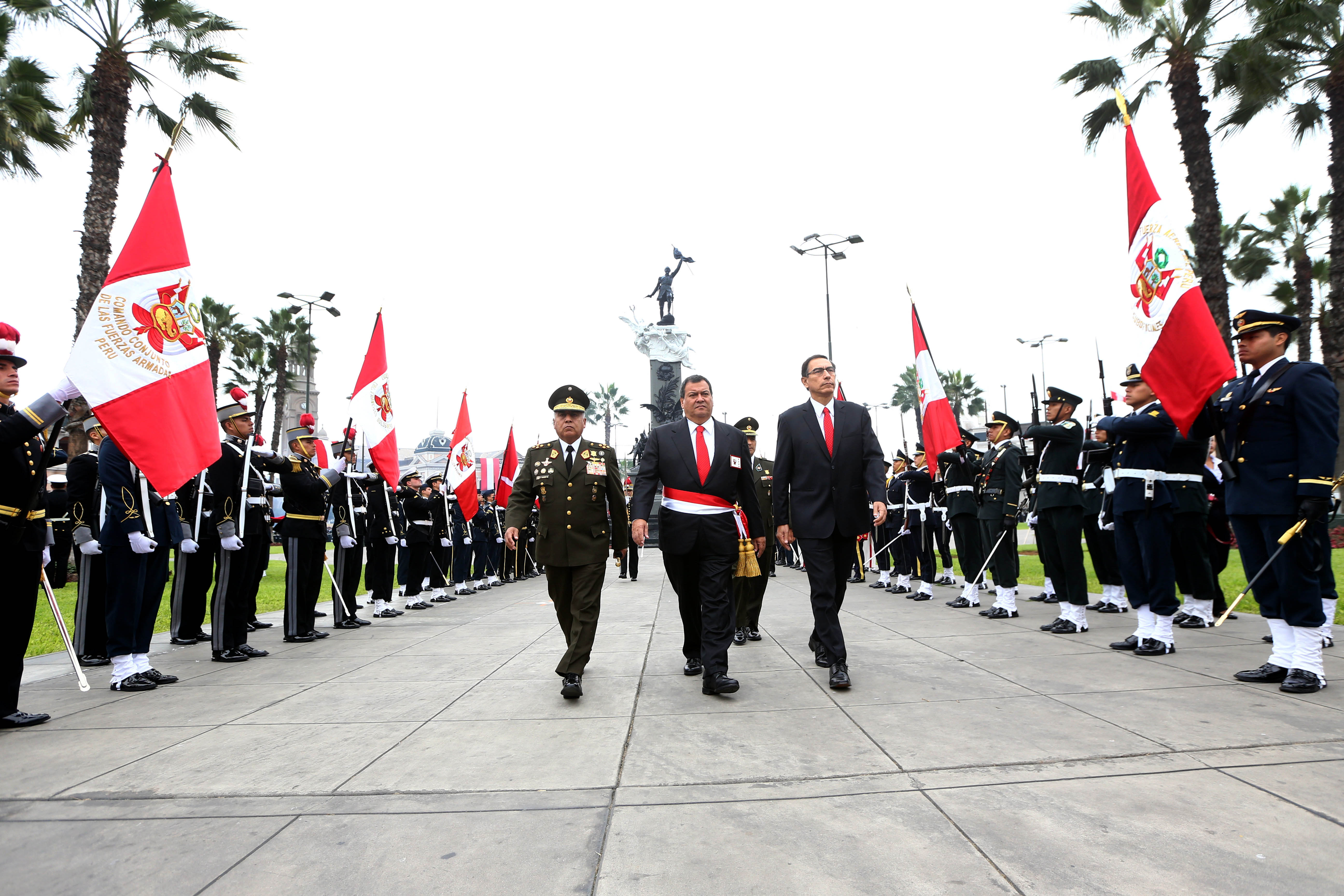 Afirmó el Ministro de Defensa durante la ceremonia por el 137° de la Batalla de Arica y Juramento de Fidelidad a la Bandera. El acto fue presidido por el vicepresidente de la República, Martín Vizcarra. Con motivo del 137° aniversario de la batalla de Arica y la renovación del juramento de fidelidad a la Bandera, el ministro de Defensa, Jorge Nieto Montesinos, afirmó que el gobierno del presidente Pedro Pablo Kuczynski está decidido a impulsar la institucionalización de las Fuerzas Armadas, así como su modernización